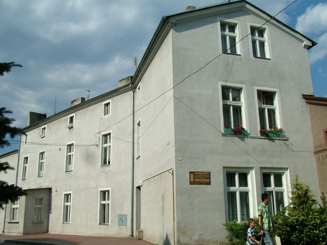 Chełmno - dom, w którym 16 listopada 1880 r. Ludwik Rydygier przeprowadził pierwszą w świecie operację częściowego wycięcia żołądka z nowotworem. Na domu jest tablica pamiątkowa Towarzystwa Chirurgów Polskich z 1970 r.